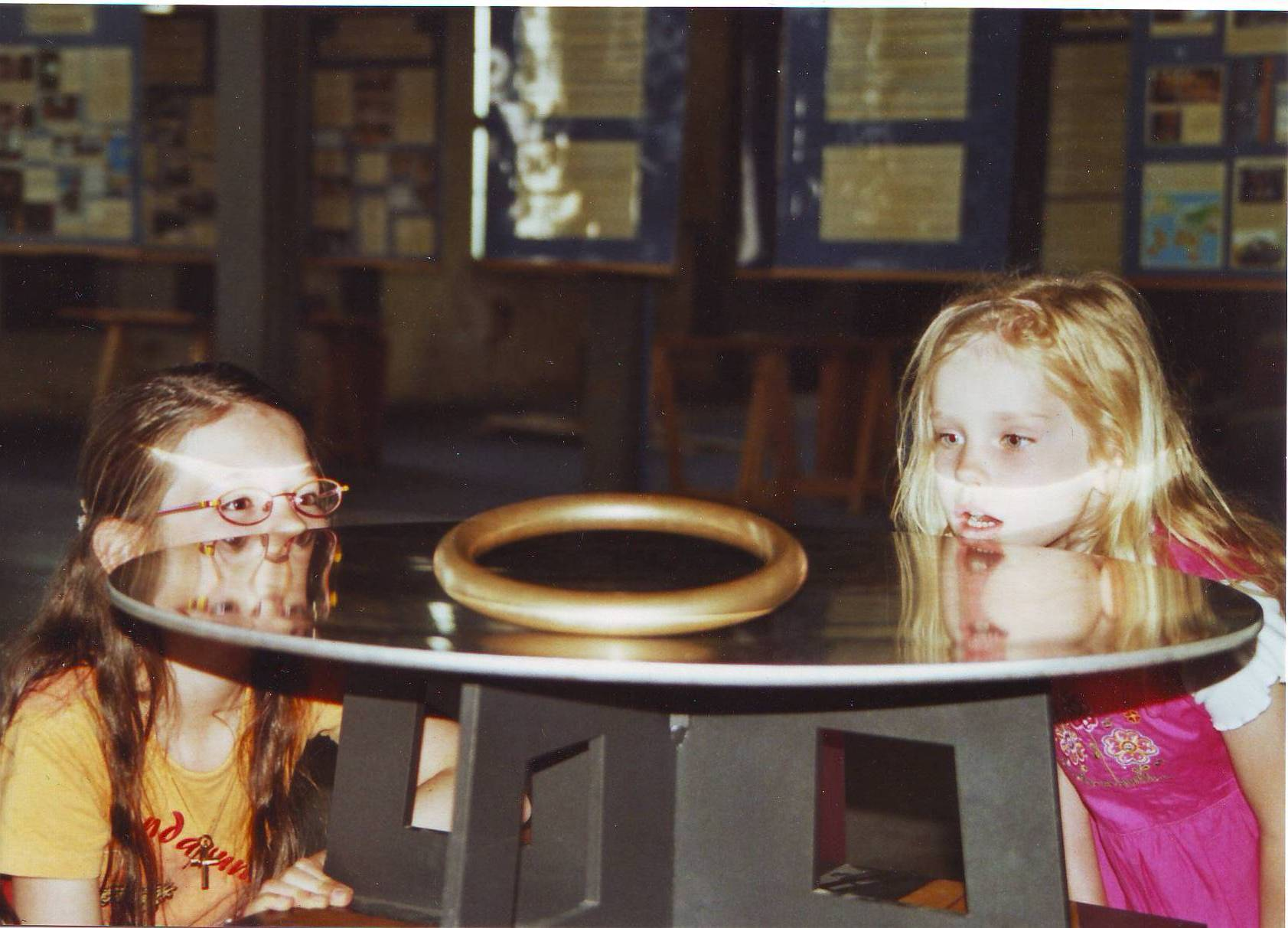 Mara Ton, Experiment in der Imaginata